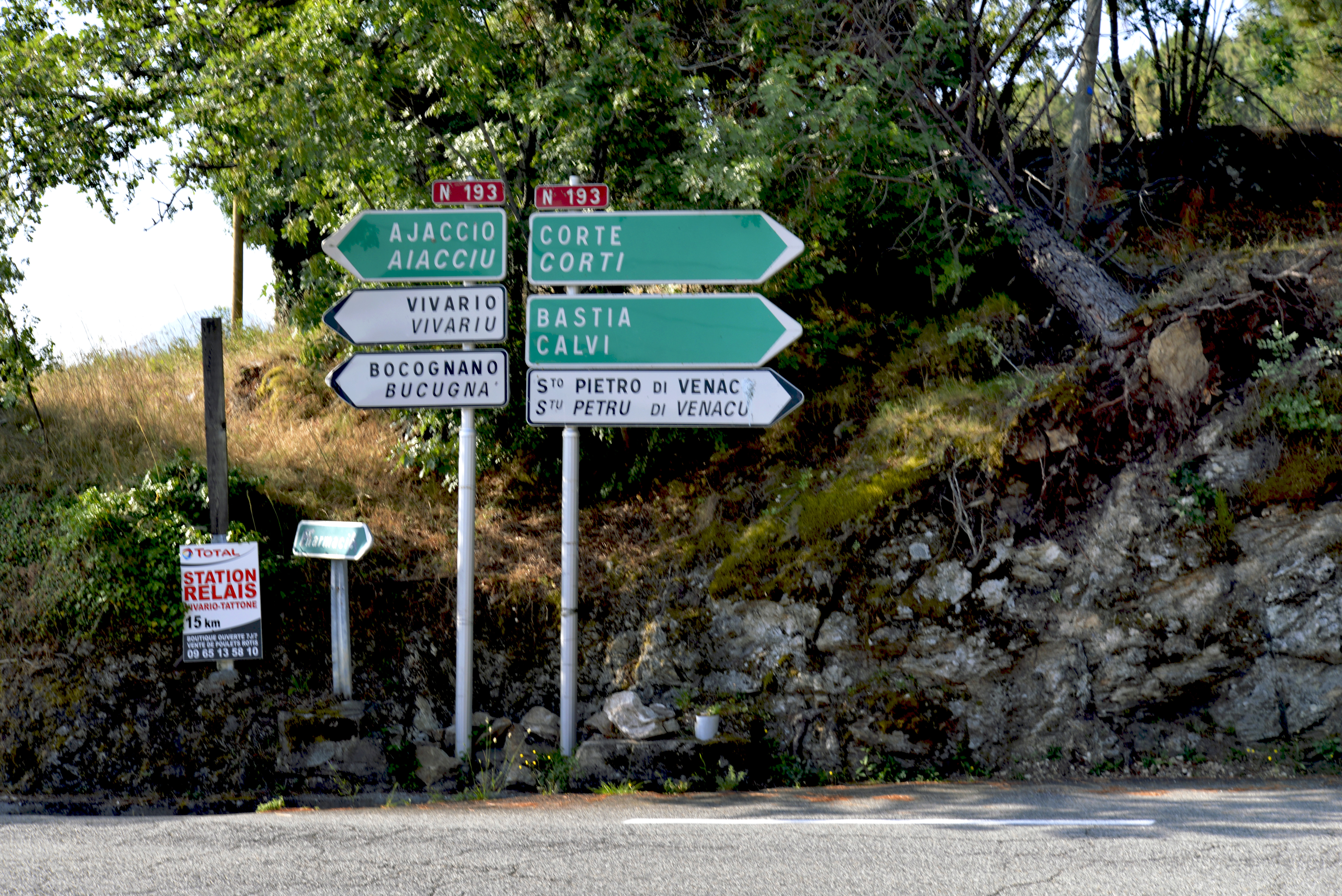 Venaco, Centre Corse - La route nationale 193 à sa jonction avec la route départementale 143